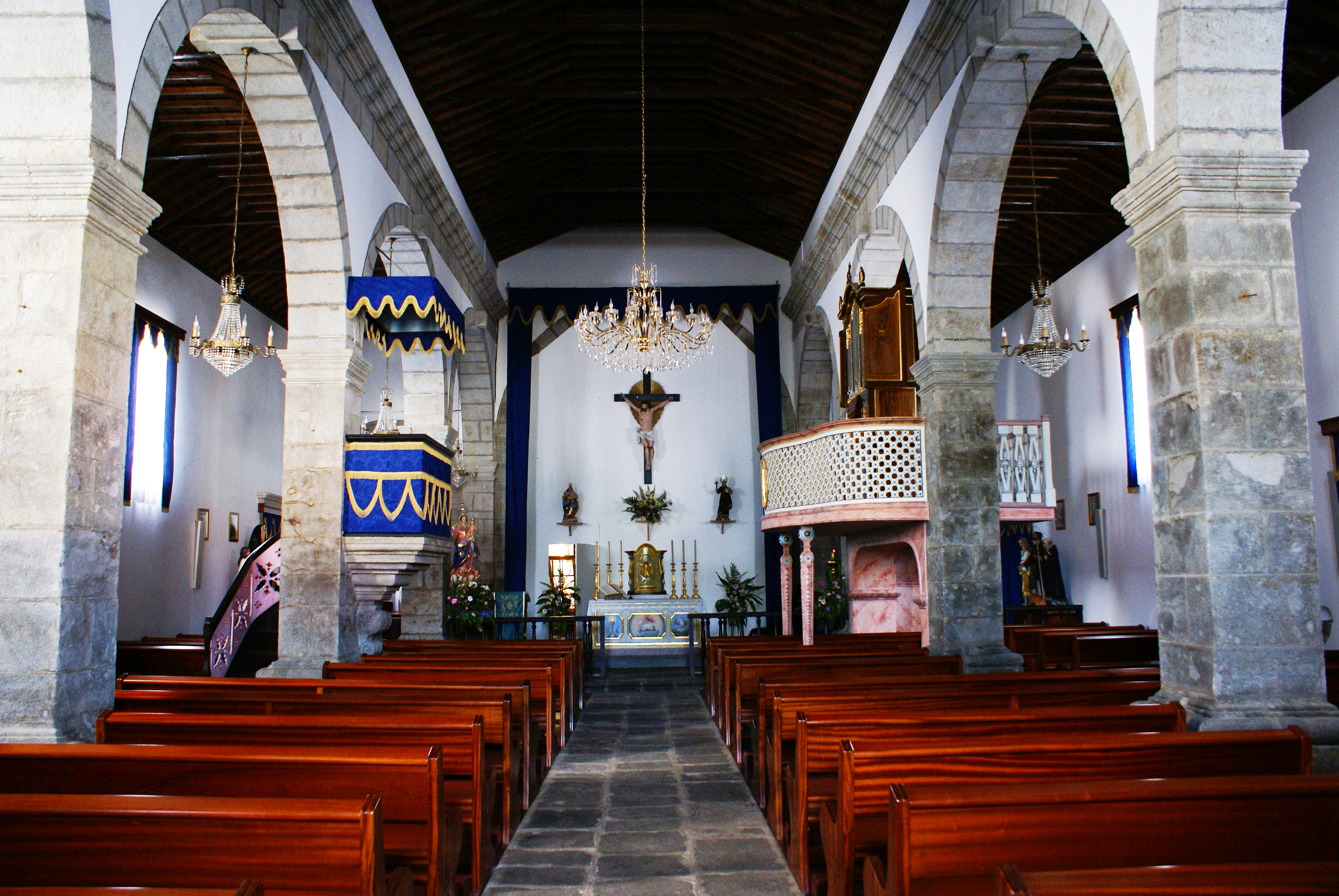 Igreja de Nossa Senhora do Guadalupe, nave central, Santa Cruz da Graciosa, ilha Graciosa, Açores, Portugal